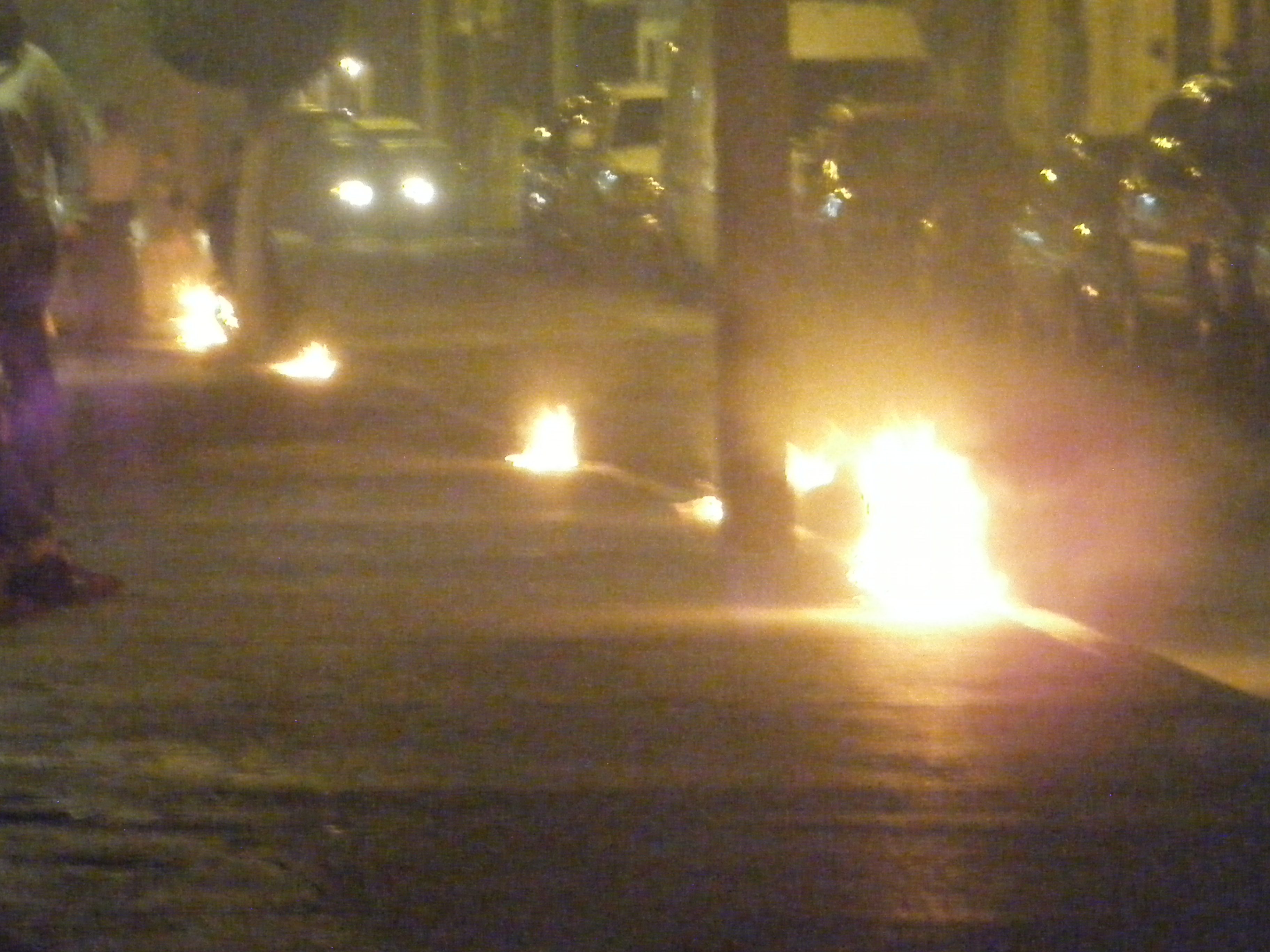 Candiles de ocote en la calle Morelos de Uriangato